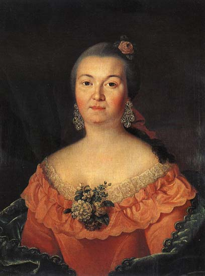 Янькова Анна Ивановна, ур. Татищева (1731—1772)